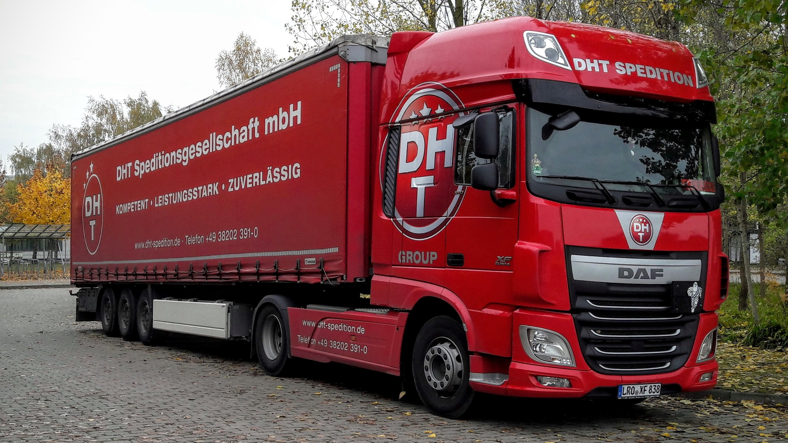 DAF XF 510